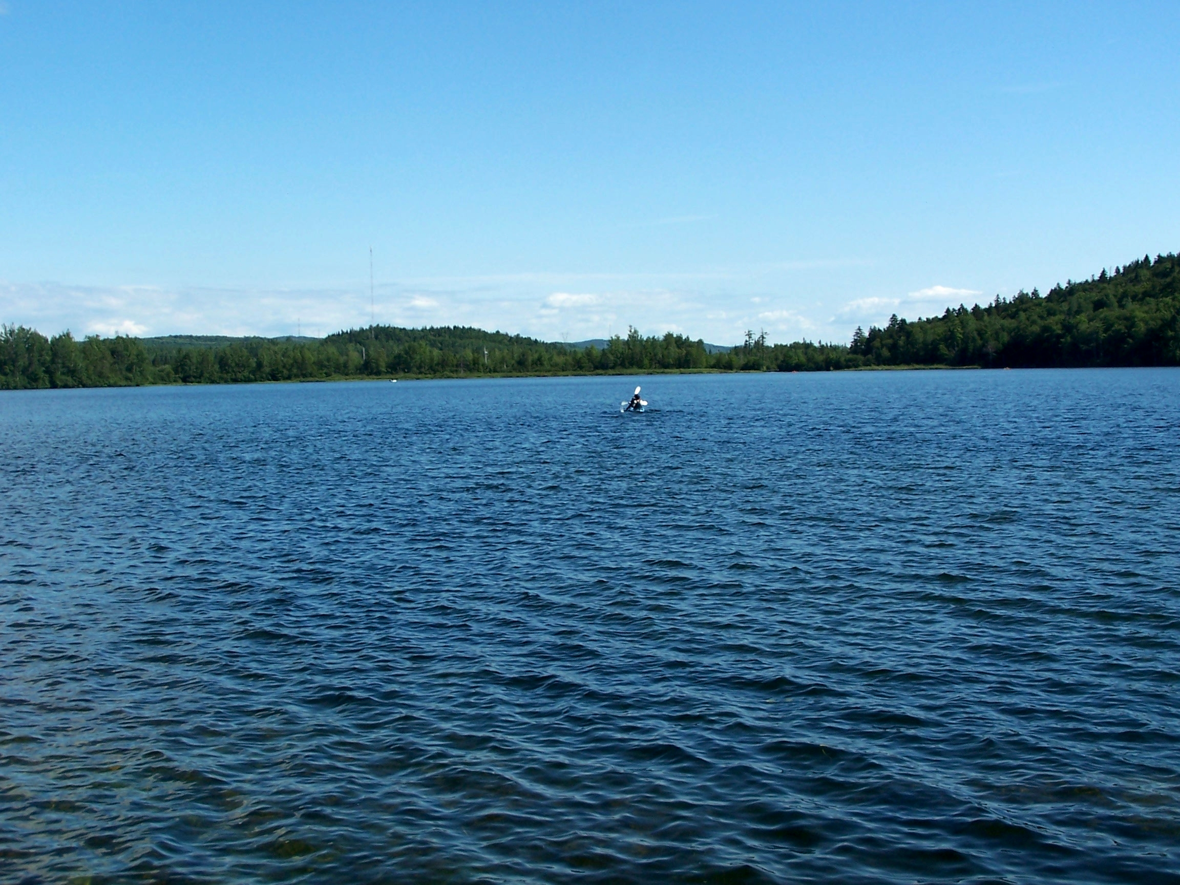 Lac Delage Québec Canada